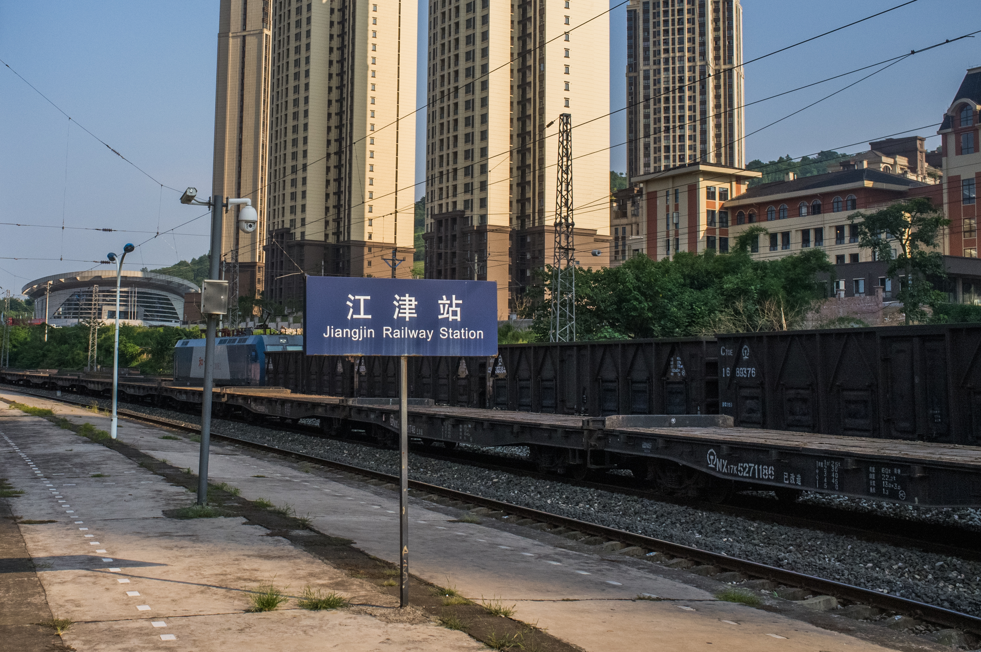 中文（中国大陆）: 成渝铁路江津站站台